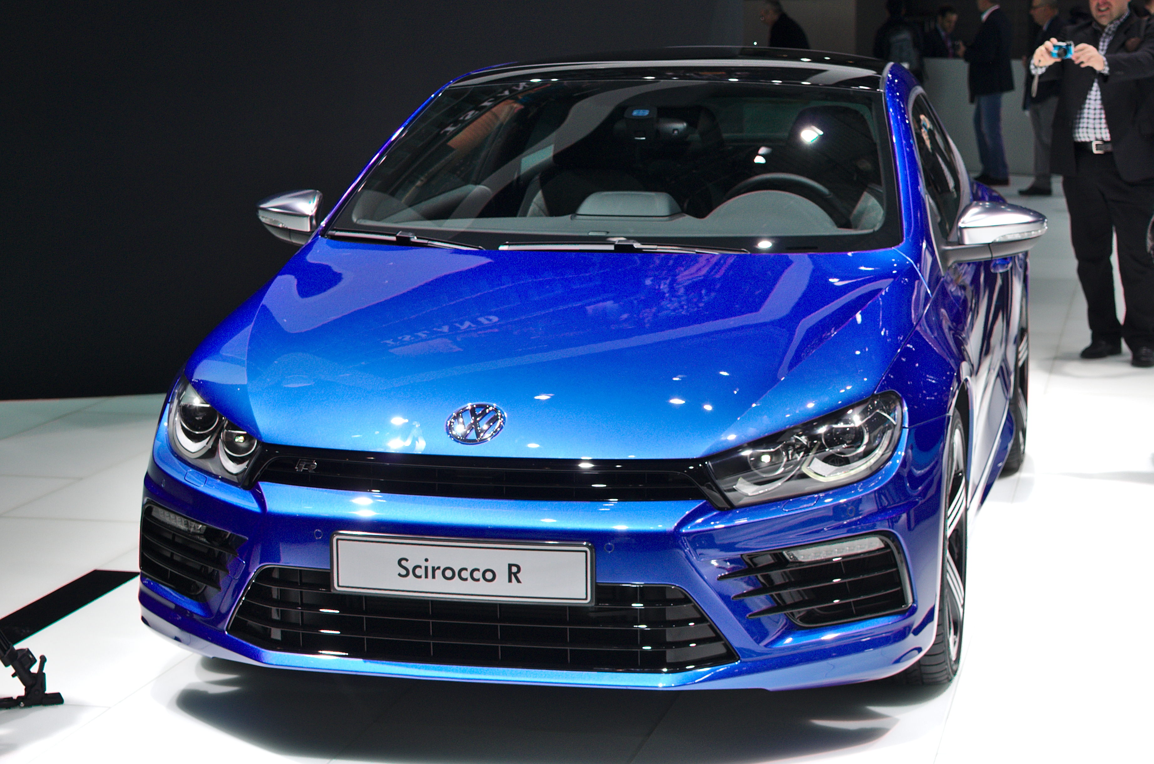 Salon de l'auto de Genève 2014 - 20140305 - Volkswagen Scirocco R